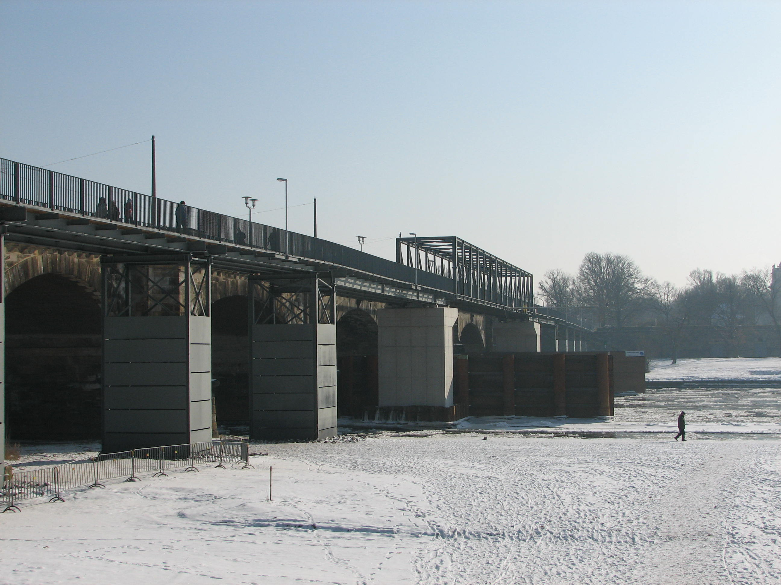 Die Fußgänger- und Radfahrerbrücke neben der wegen Sanierungsarbeiten teilgesperrten Albertbrücke in Dresden, Februar 2012 im Winter.